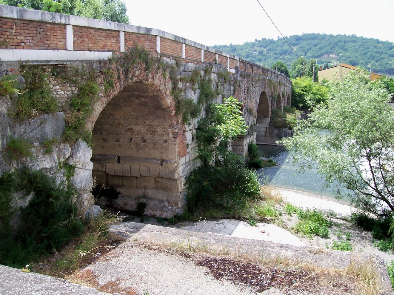 Ponte Leproso, BeneventoOld Bridge